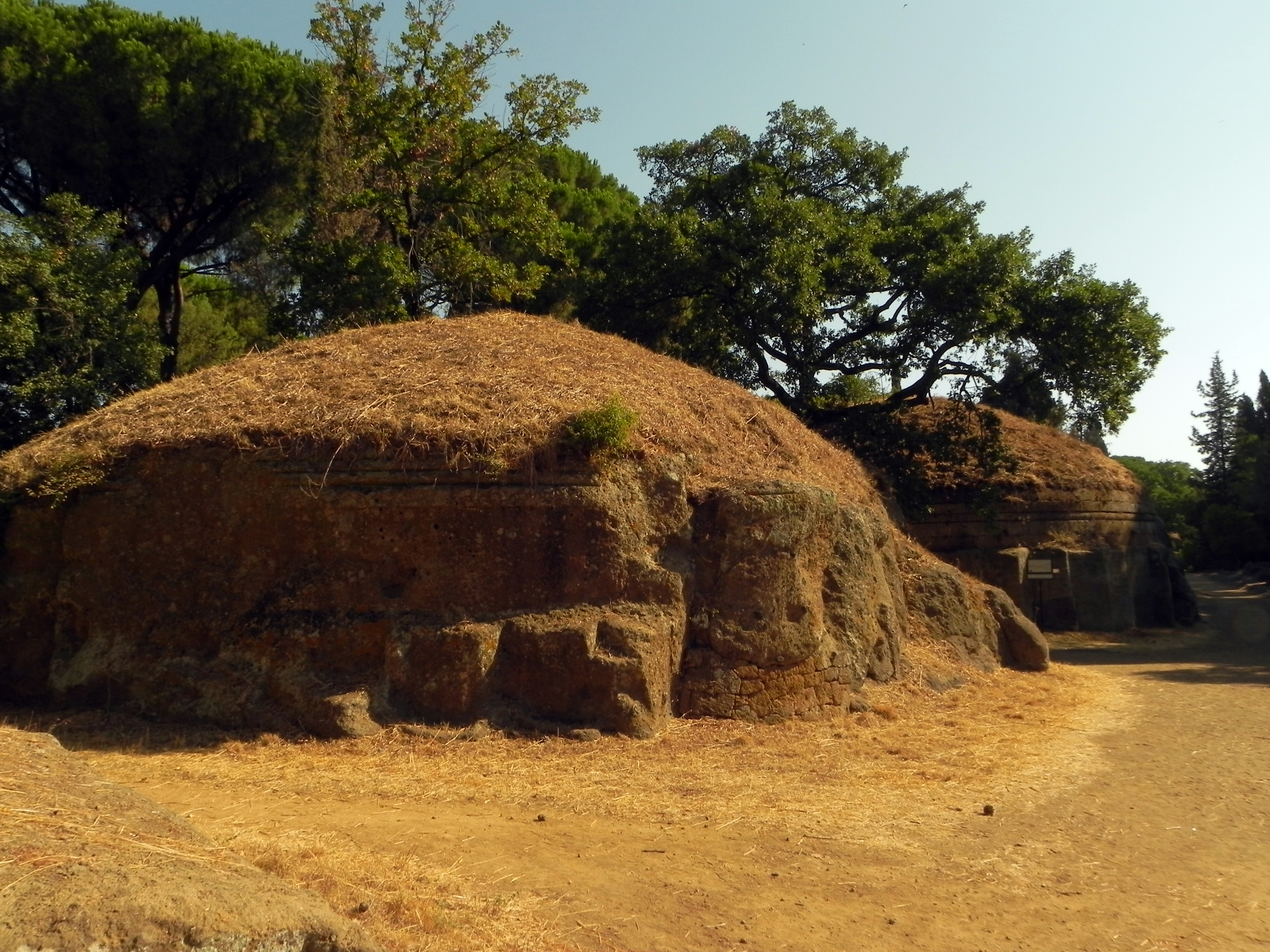 Necropoli della Banditaccia - MIBAC This is a photo of a monument which is part of cultural heritage of Italy.